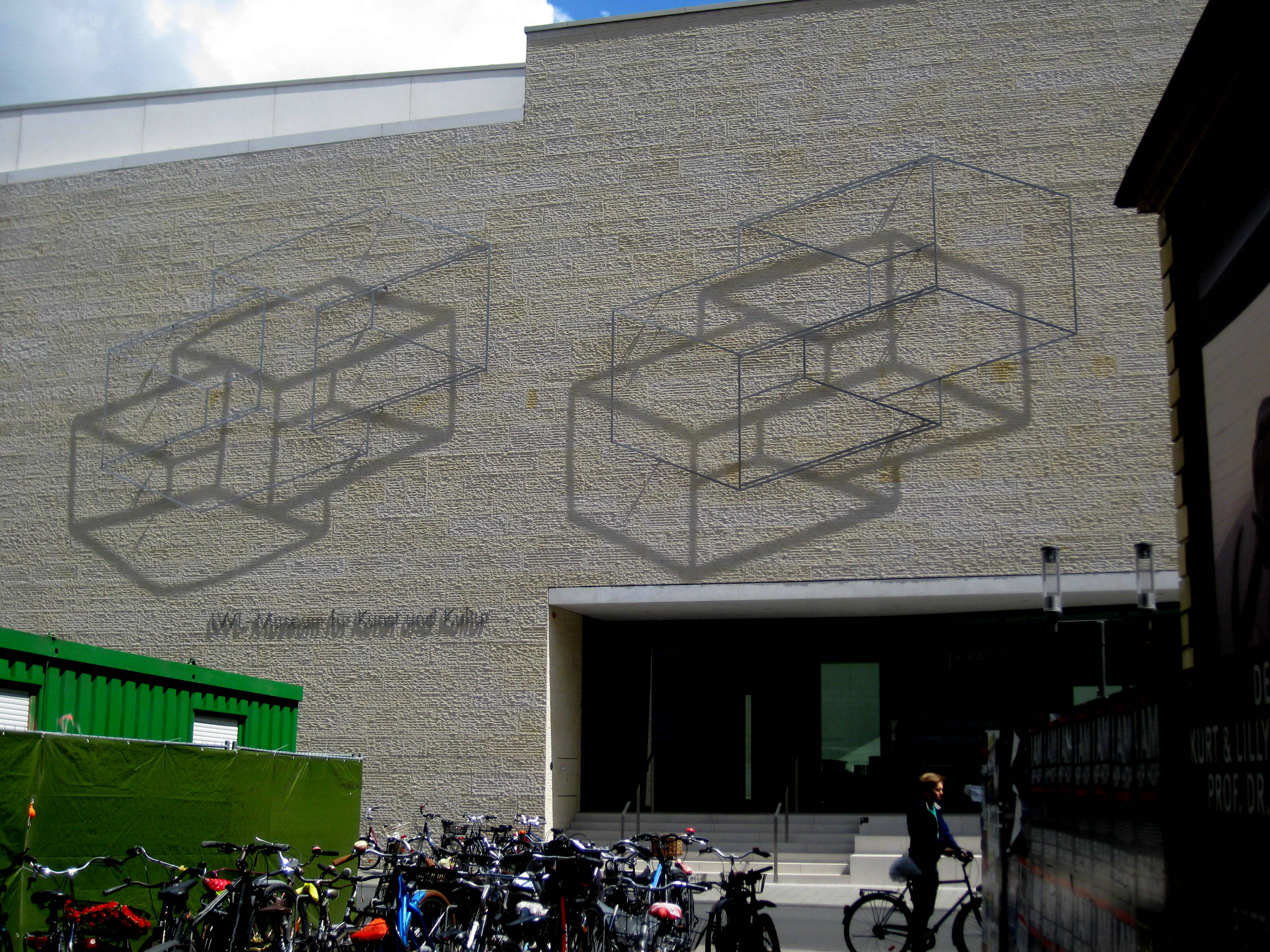 Neuer Standort auf der Seitenfront (Pferdegasse) des LWL-Museum für Kunst und Kultur, Münster